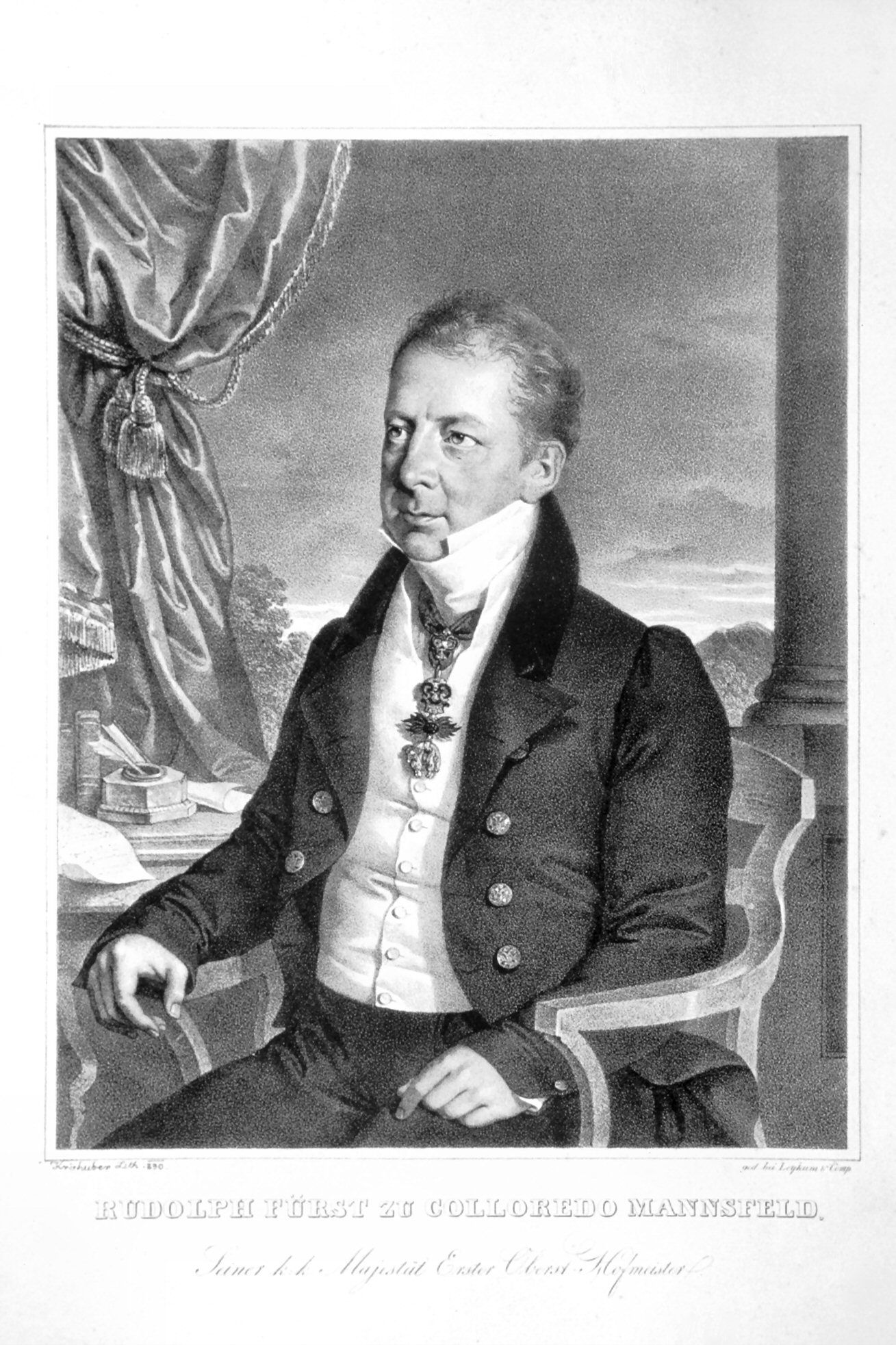 Rudolf Josef Colloredo-Mansfeld (1772-1843), Obersthofmeister, Ritter des goldenen Vliesses Lithographie von Josef Kriehuber, 1830